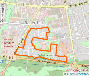 Lagekarte Siedlung Volkspark, Köln, OSM Volksparksiedlung Raderthal (238121843), Zoomstufe 14 This map of Köln was created from OpenStreetMap project data, collected by the community. This map may be incomplete, and may contain errors. Don't rely solely on it for navigation.